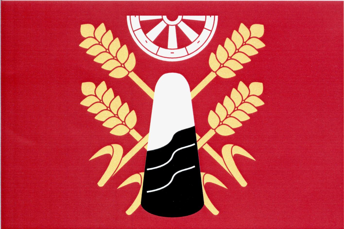 Vlajka obce Úžice (okres Mělník)